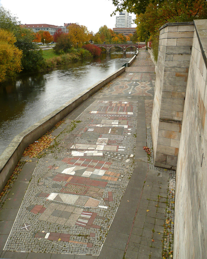 Hohes Ufer mit Mosaik